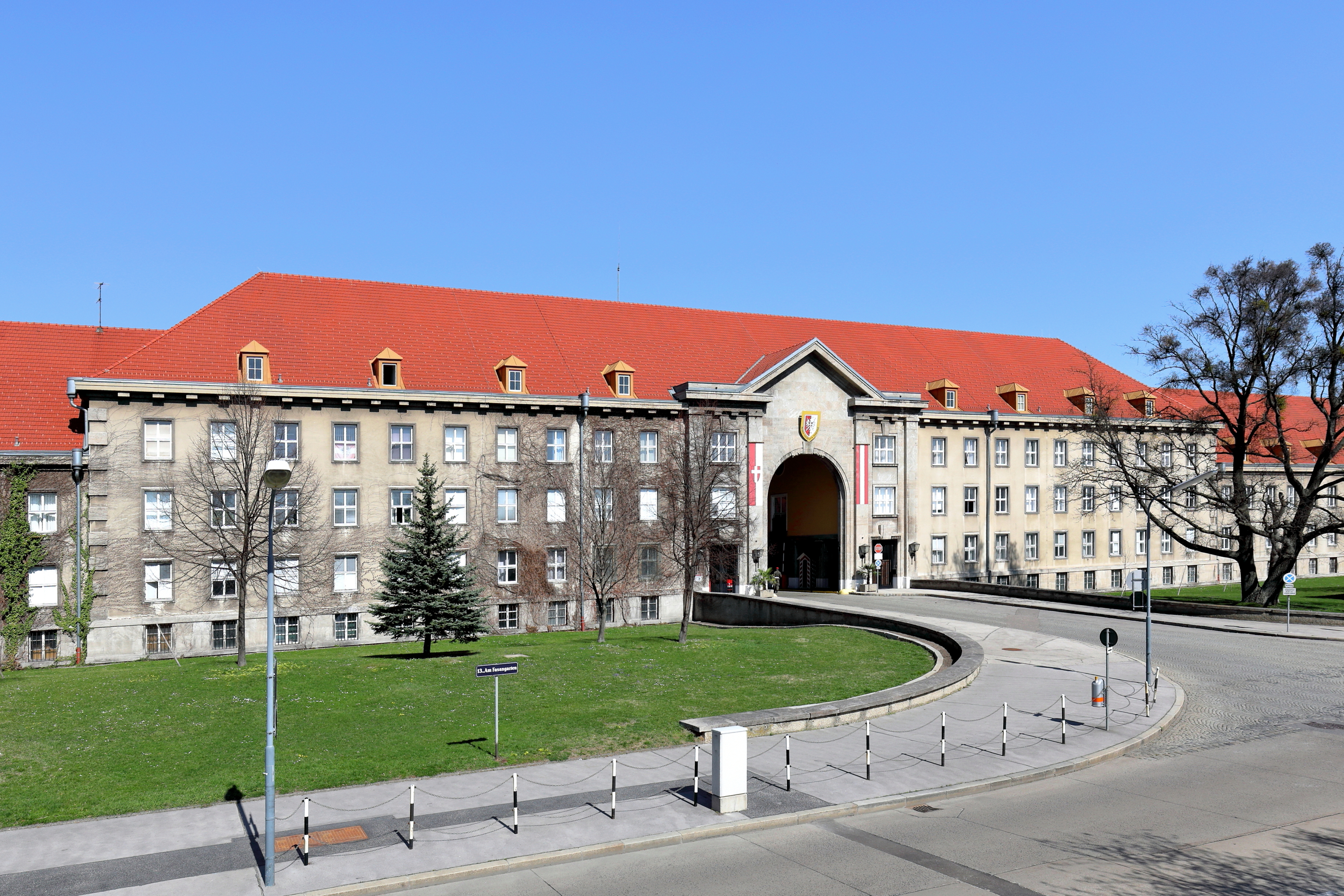 Das Kommandogebäude der Maria-Theresien-Kaserne im 13. Wiener Gemeindebezirk Hietzing.Wiens größte Kaserne mit 282.900 m² wurde 1937 als Bau einer Dollfuß-Führerschule begonnen. Nach dem Anschluss wurde der halbfertige Bau bis 1940 als Kaserne für die SS, später Waffen-SS ausgebaut und fertiggestellt. Nach dem Krieg bezogen die britischen Besatzungstruppen die Kaserne. Ursprünglich war der Name „Fasangartenkaserne“ und anlässlich des 250. Geburtstages Maria Theresias erfolgte am 13. Mai 1967 die Umbenennung in Maria-Theresien-Kaserne. Die bekanntesten der hier stationierten Wiener Verbände sind das Gardebataillon und das Jägeregiment 2 mit seiner Hoch- und Deutschmeister-Tradition. Gemeinsam mit den sechs Flaktürmen ist die Kaserne das größte und sichtbarste Bauwerk, das an die Zeit des Nationalsozialismus in Wien erinnert.